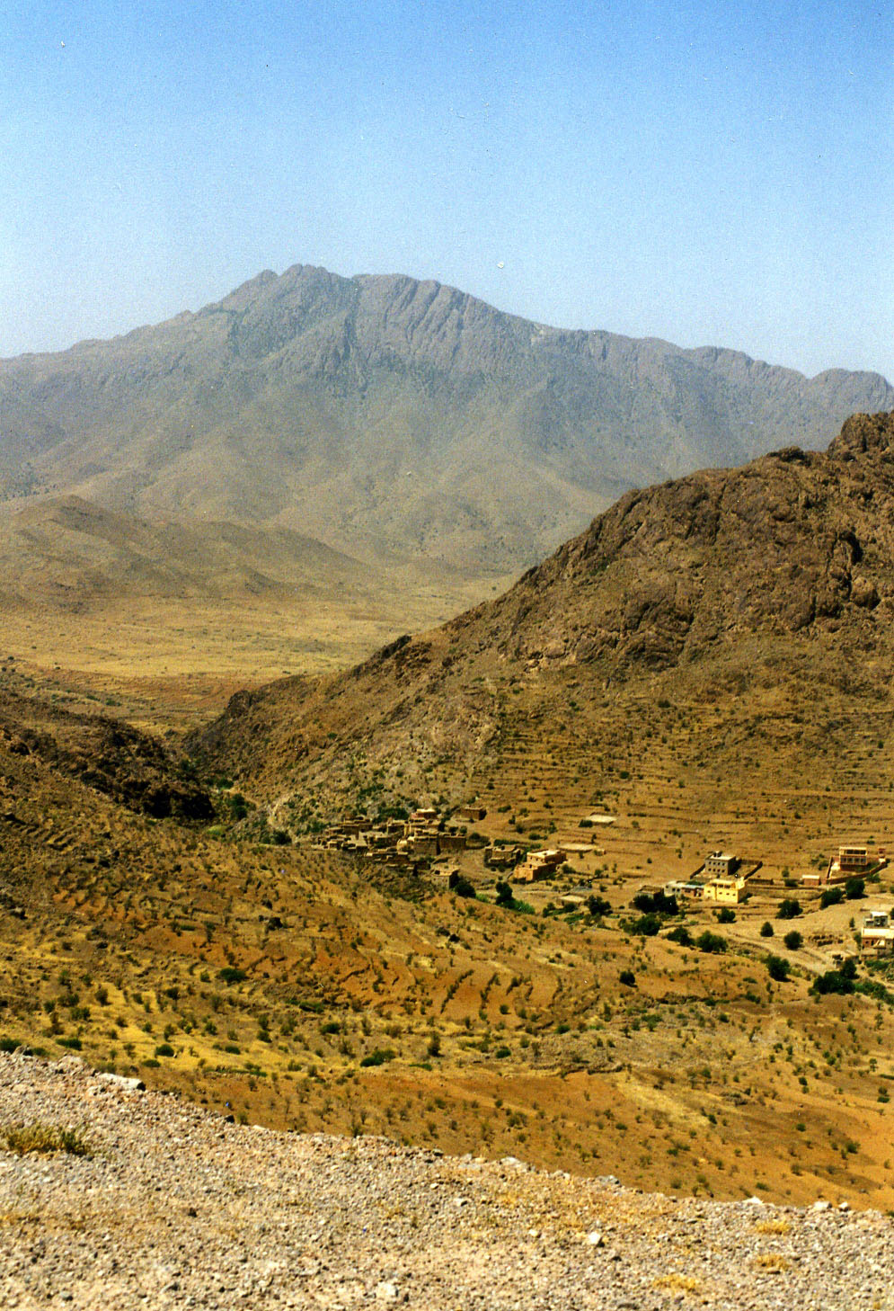 Region-Taroudannt-Südmarokko